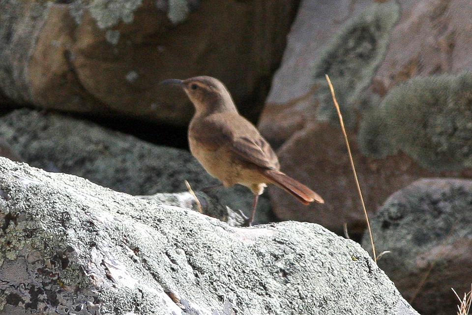 Yavi to St Victoria to Yavi